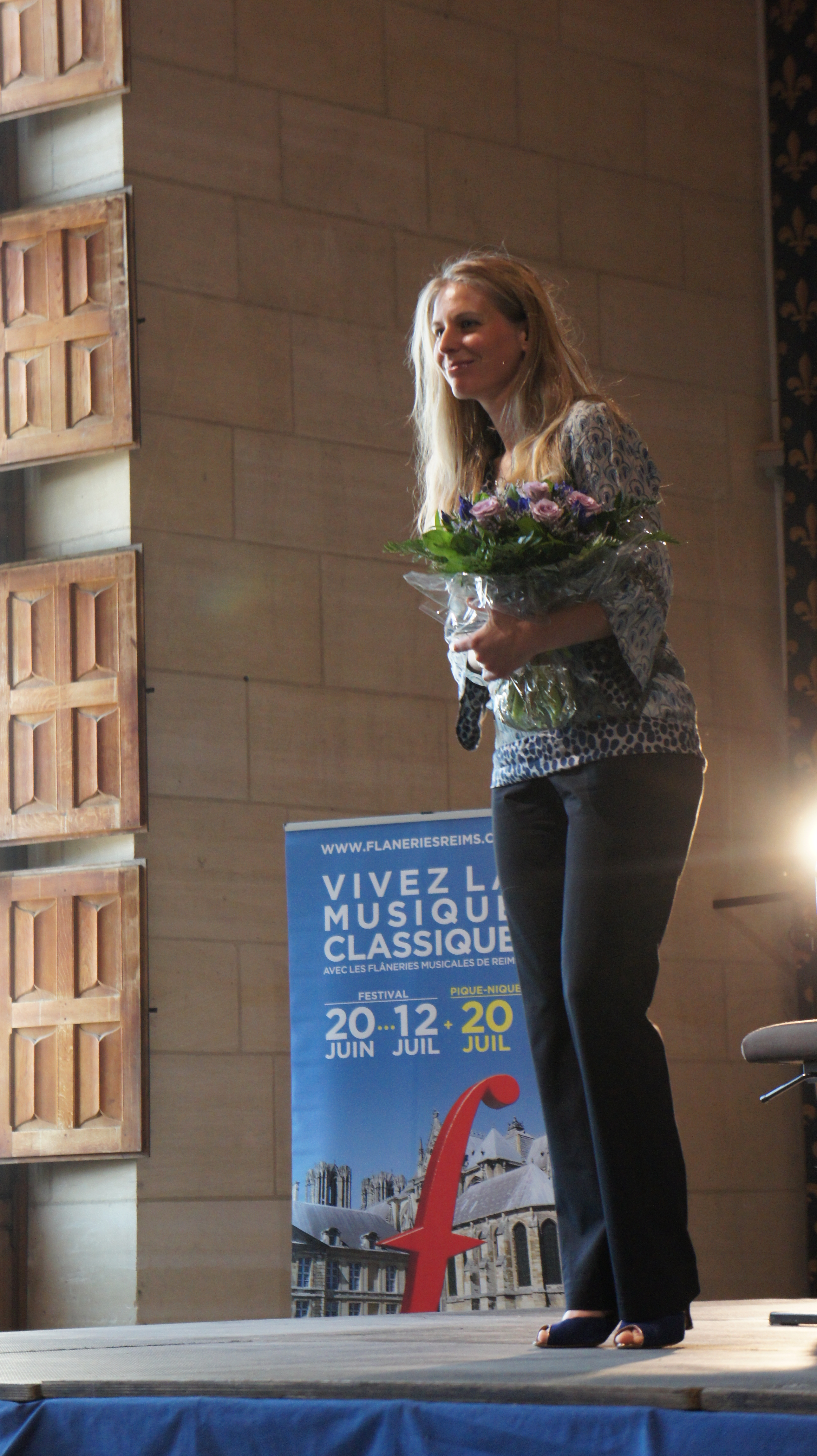 Lors des Flaneries musicales de 2013 en la salle du banquet du palais du Tau.